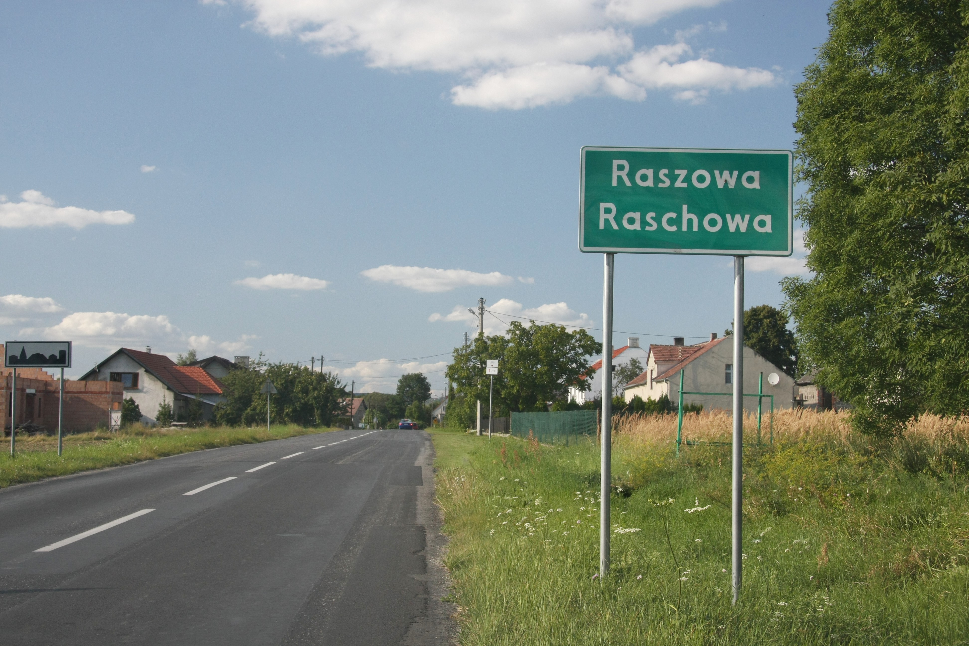 Dwujęzyczna tablica z nazwą przed wjazdem do Raszowej